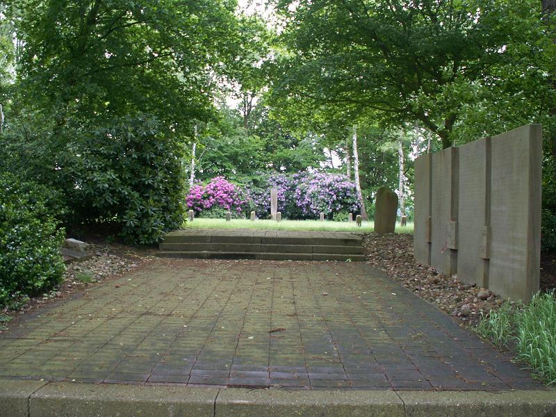 Kamp Versen